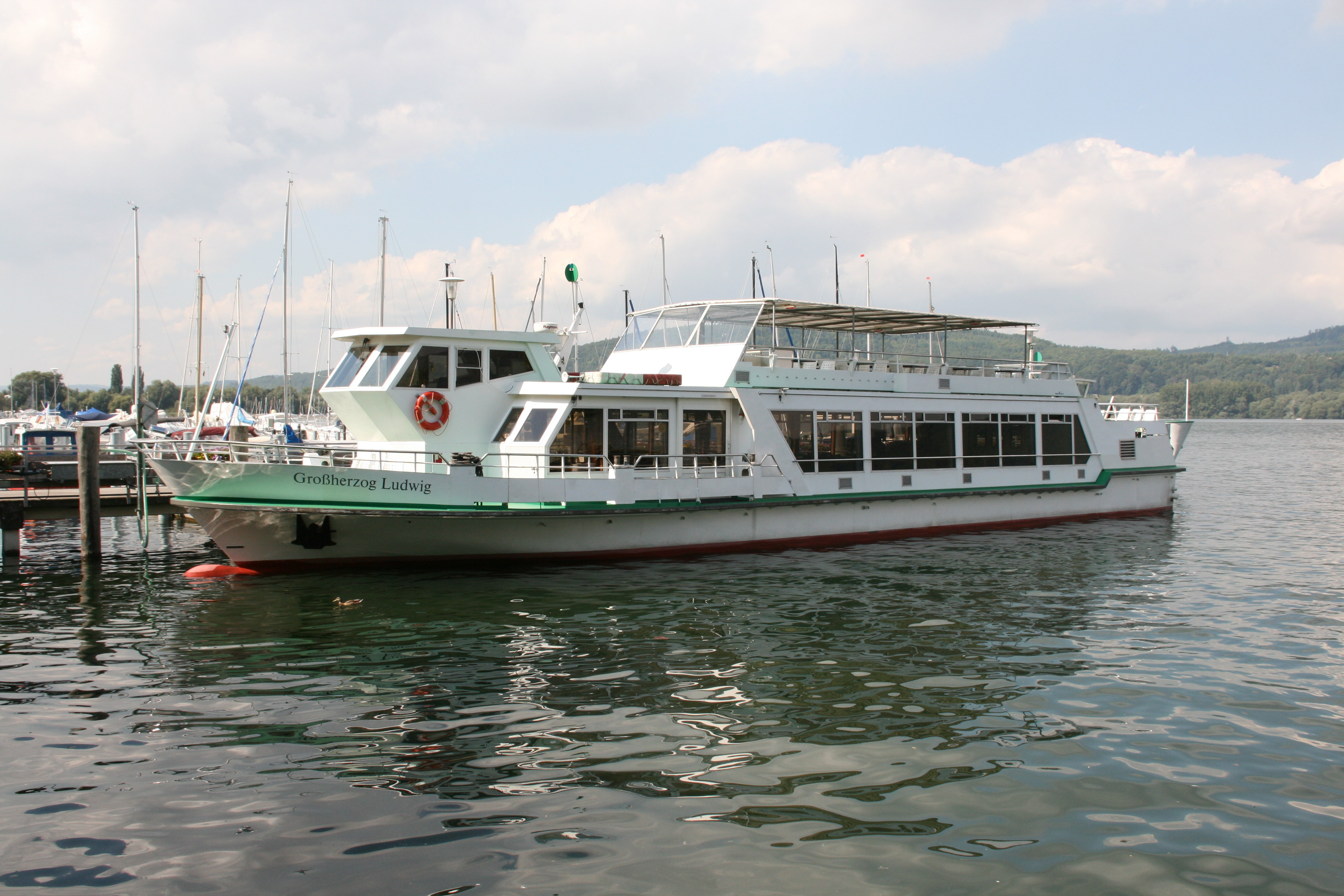 „Großherzog Ludwig“, Marina an der Seestraße in Bodman, Bodman-Ludwigshafen